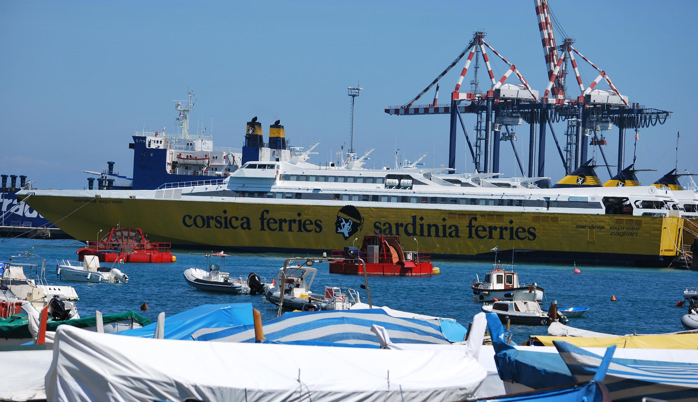 Navire de Corsica Ferries désarmés à Vado Ligure